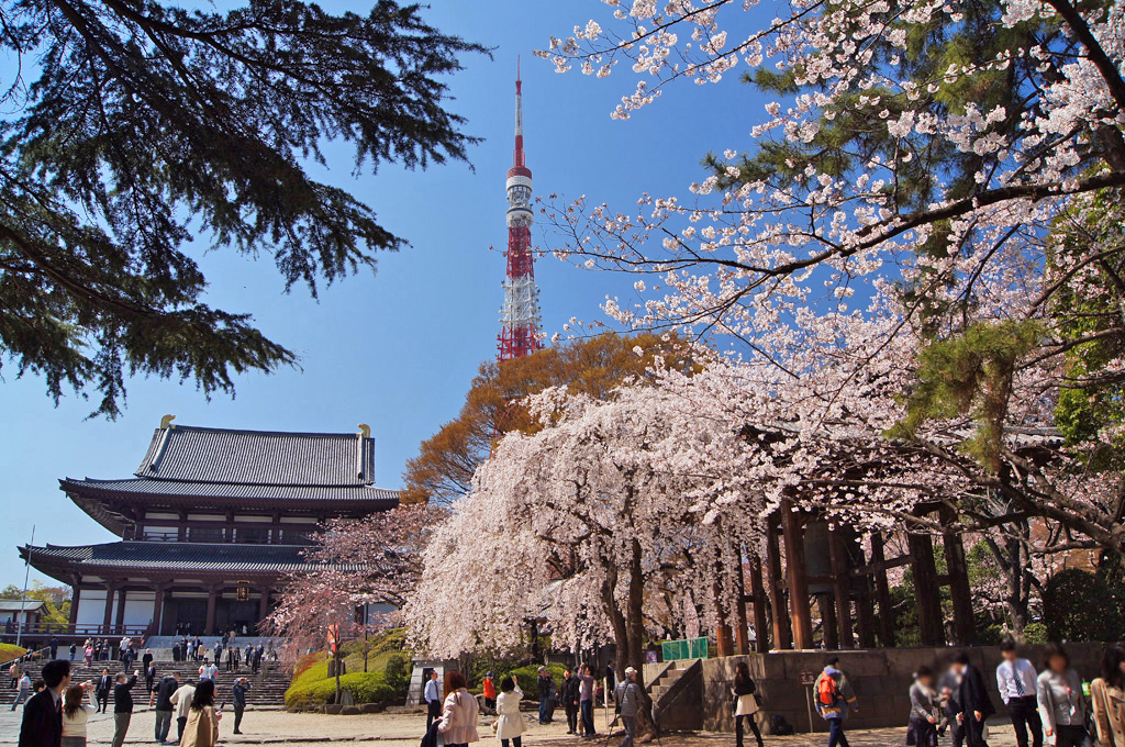 春の増上寺と東京タワー